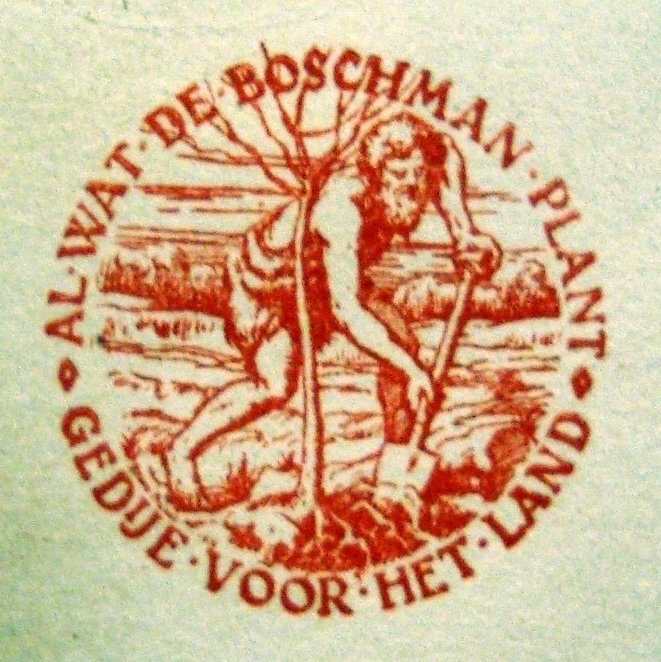 Het embleem van de uitgeverij Buschmann is een man die een boom plant, met als motto "Al wat de bosman plant, gedije voor het land".